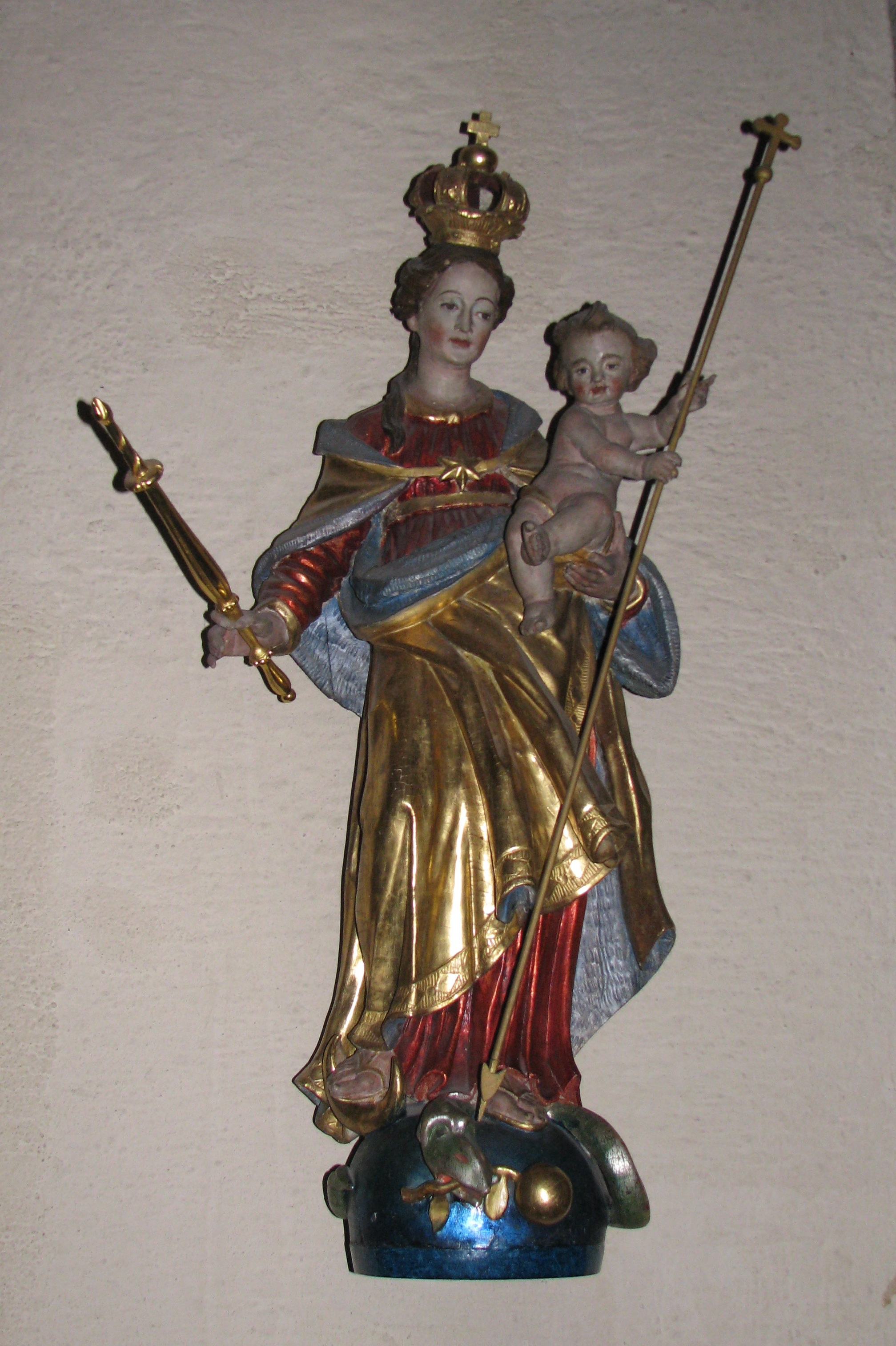 Pfarrkirche St. Vitus, Heidelberg-Handschuhsheim: barocke Madonna mit Kind